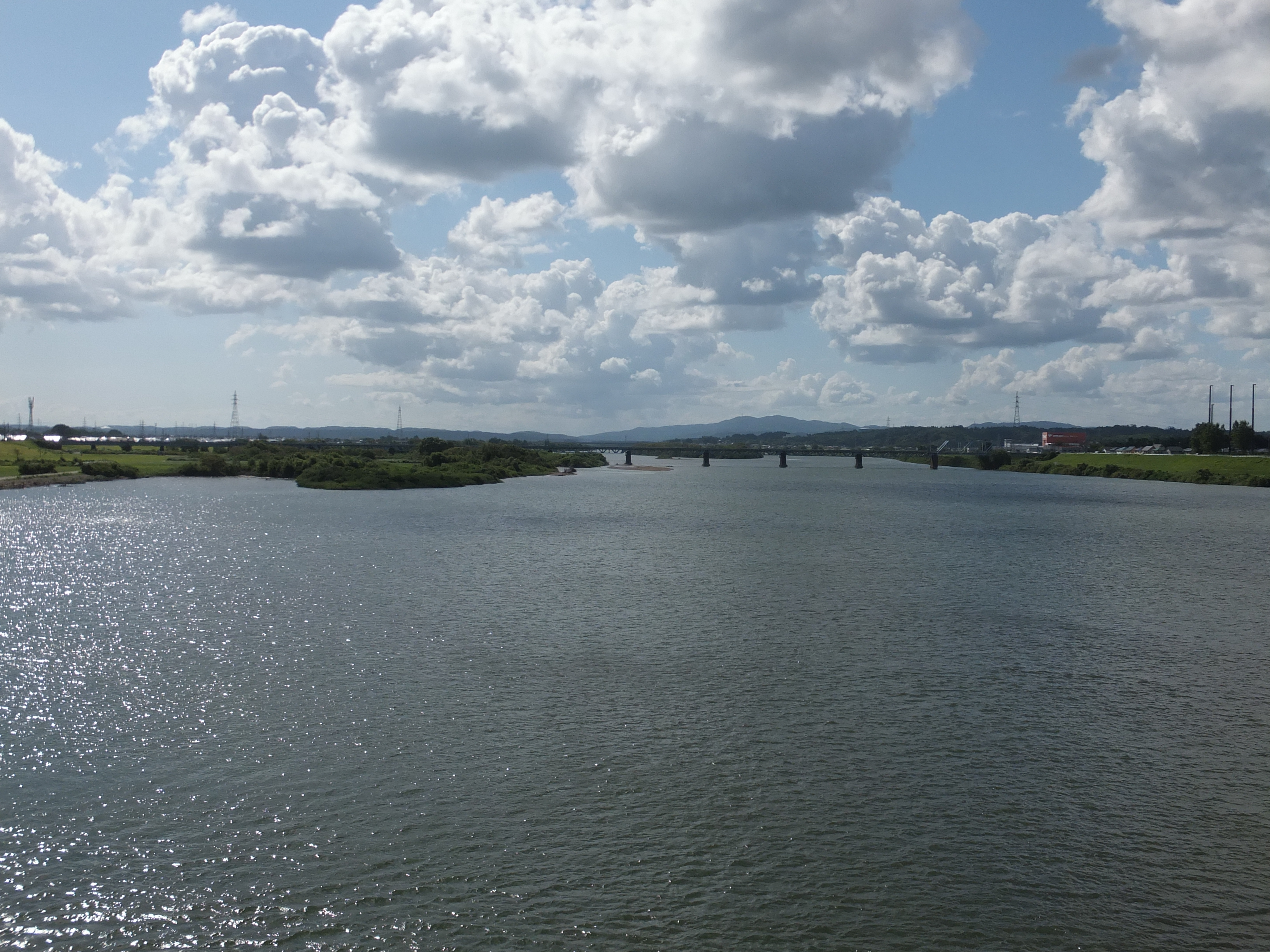 秋田大橋から見た雄物川